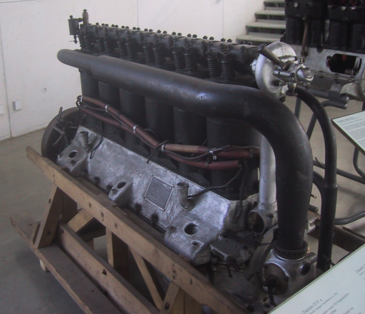 Daimler D IV Aircraft Engine, Deutsches Museum